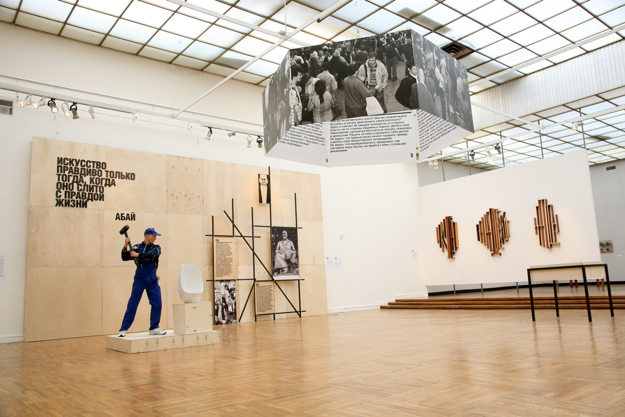 выставка Арсения Жиляева "Музей пролетарской культуры. Индустриализация богемы"